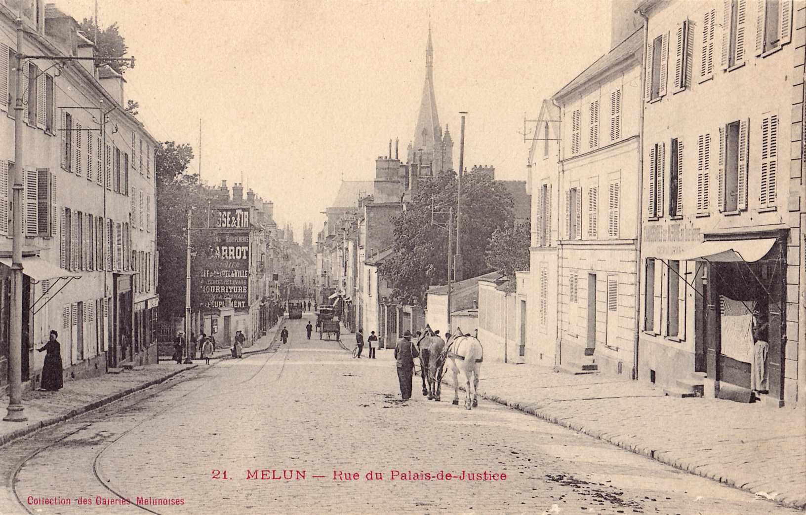 Carte postale ancienne éditée par Galeries Melinoise, n° 21 :MELUN - Rue du Palais de Justice